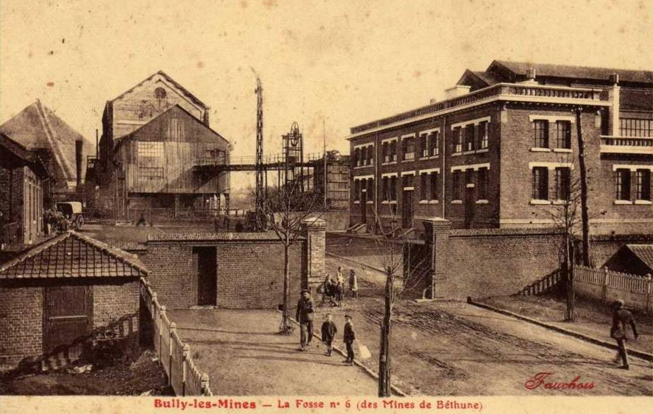 La fosse n° 6 - 6 bis de la Compagnie des mines de Béthune était un charbonnage du bassin minier du Nord-Pas-de-Calais constitué de deux puits situé à Mazingarbe, Pas-de-Calais, Nord-Pas-de-Calais, France.